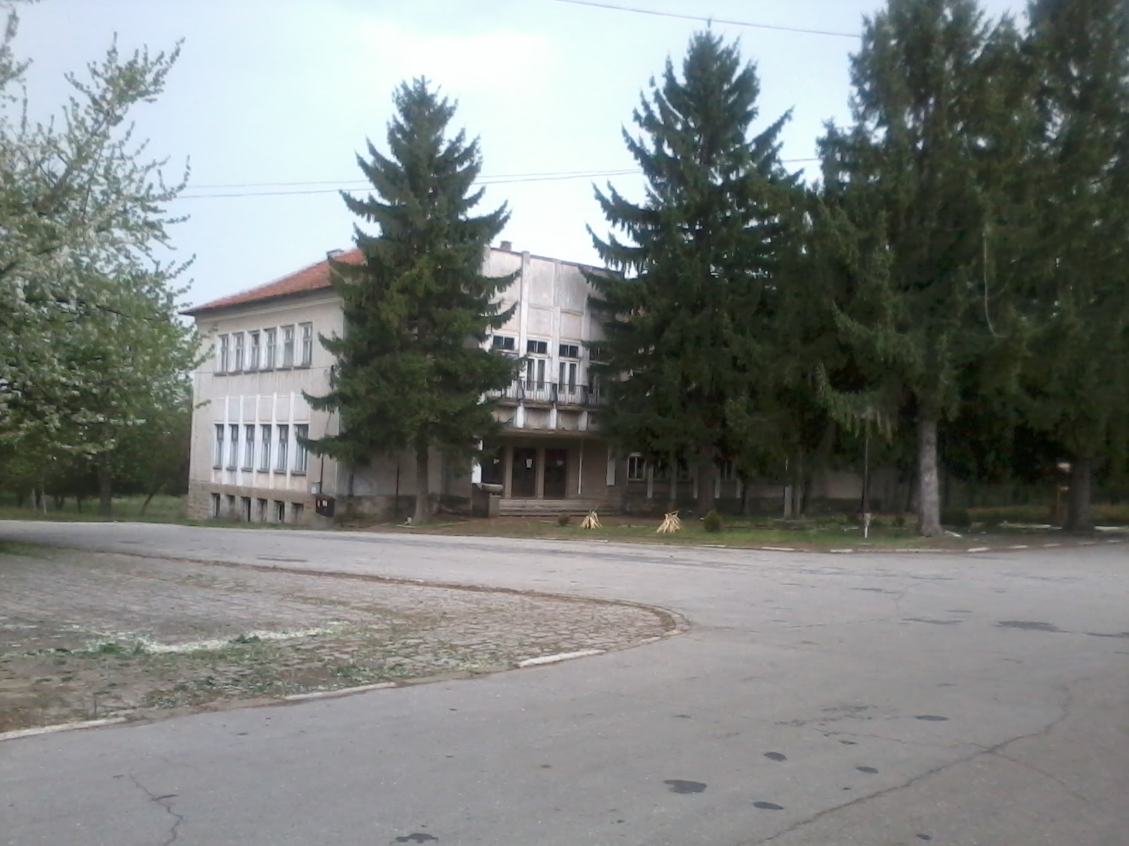 Центърът на с. Червена